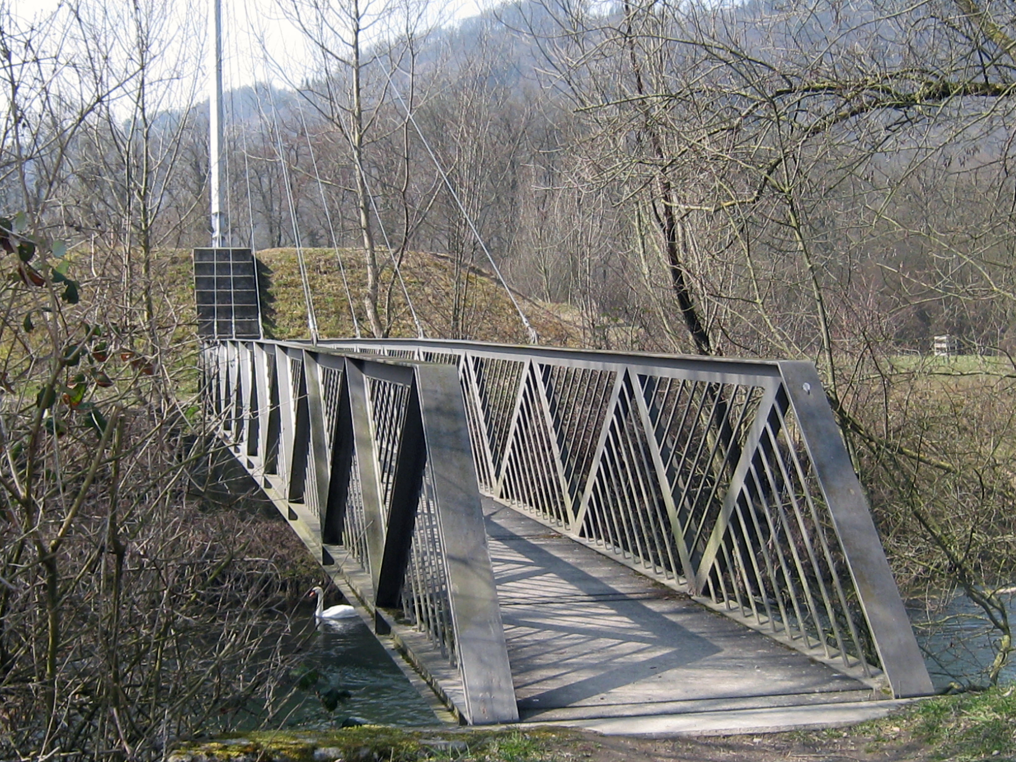 Limmatspitz, Steg erbaut von der Felddivision 5